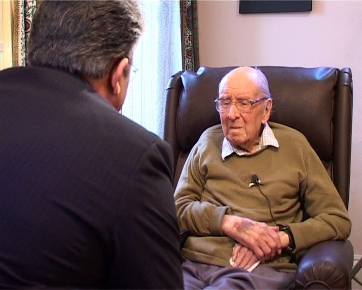 مونتگمری وات